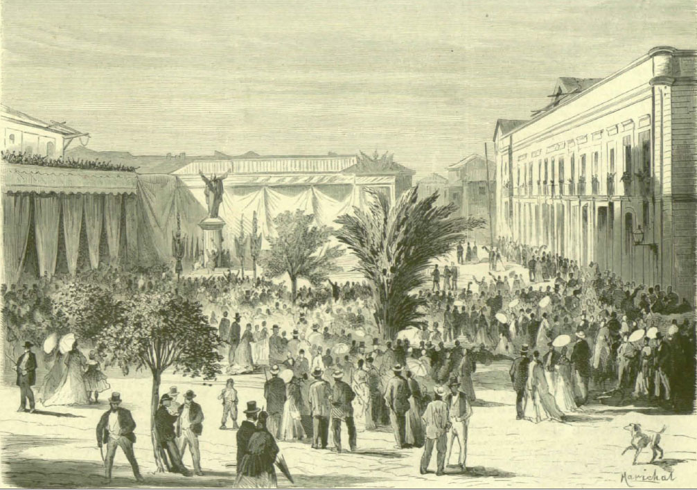 Grabado del francés Gaston Marichal para la revista La Ilustración Española y Americana que reproduce una escena de la inauguración del monumento a las numerosas víctimas que hubo en el incendio de la iglesia de la Compañía en Santiago ocurrido el día de la Inmaculada Concepción, el 8 de diciembre de 1863